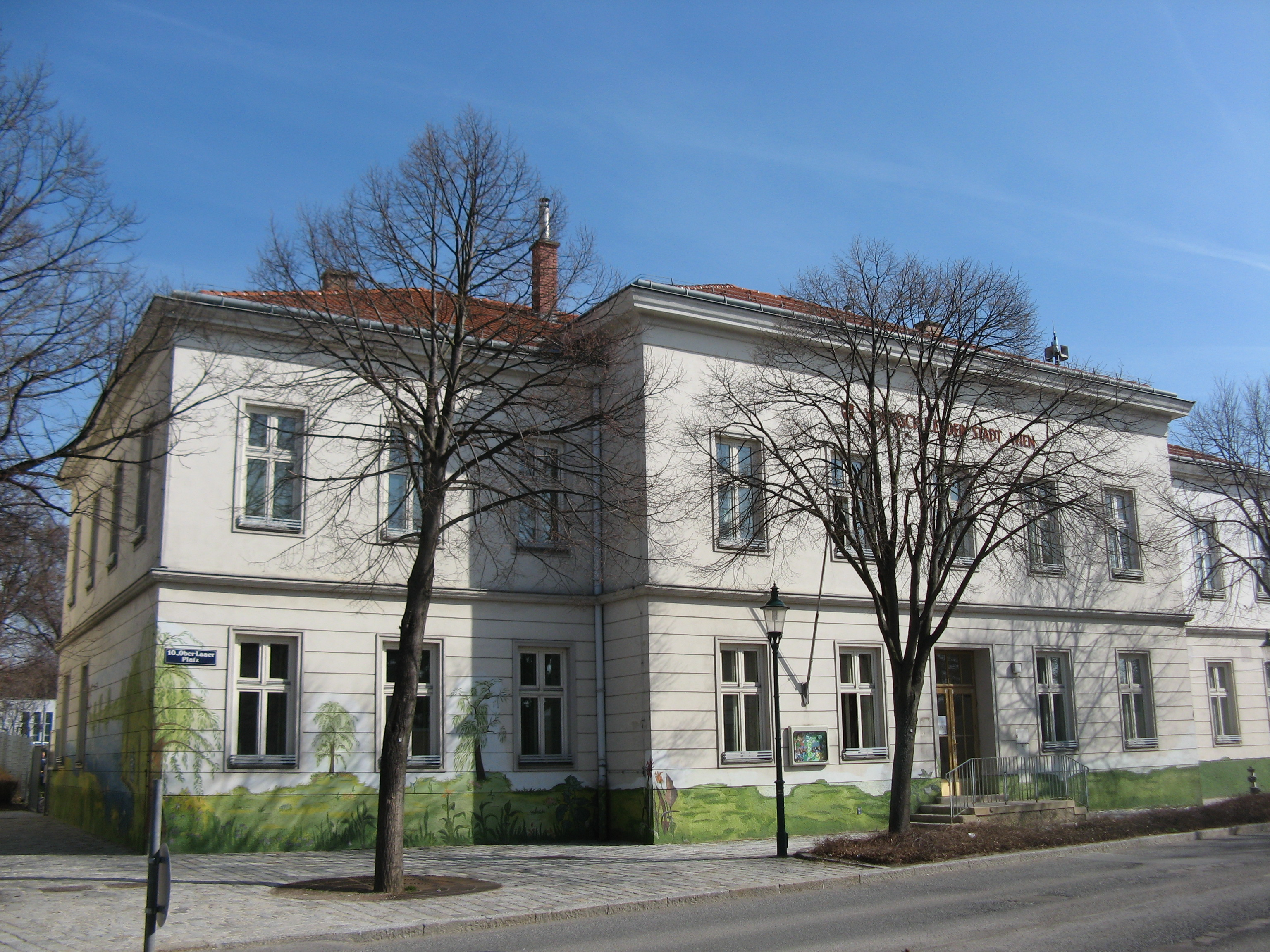 Schule, Ober-Laaer-Platz 1, Wien-Favoriten